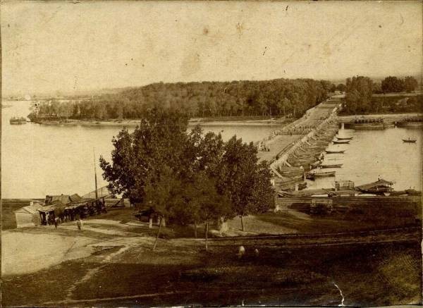 Аксайская переправа в Области Войска Донского, Российская империя.